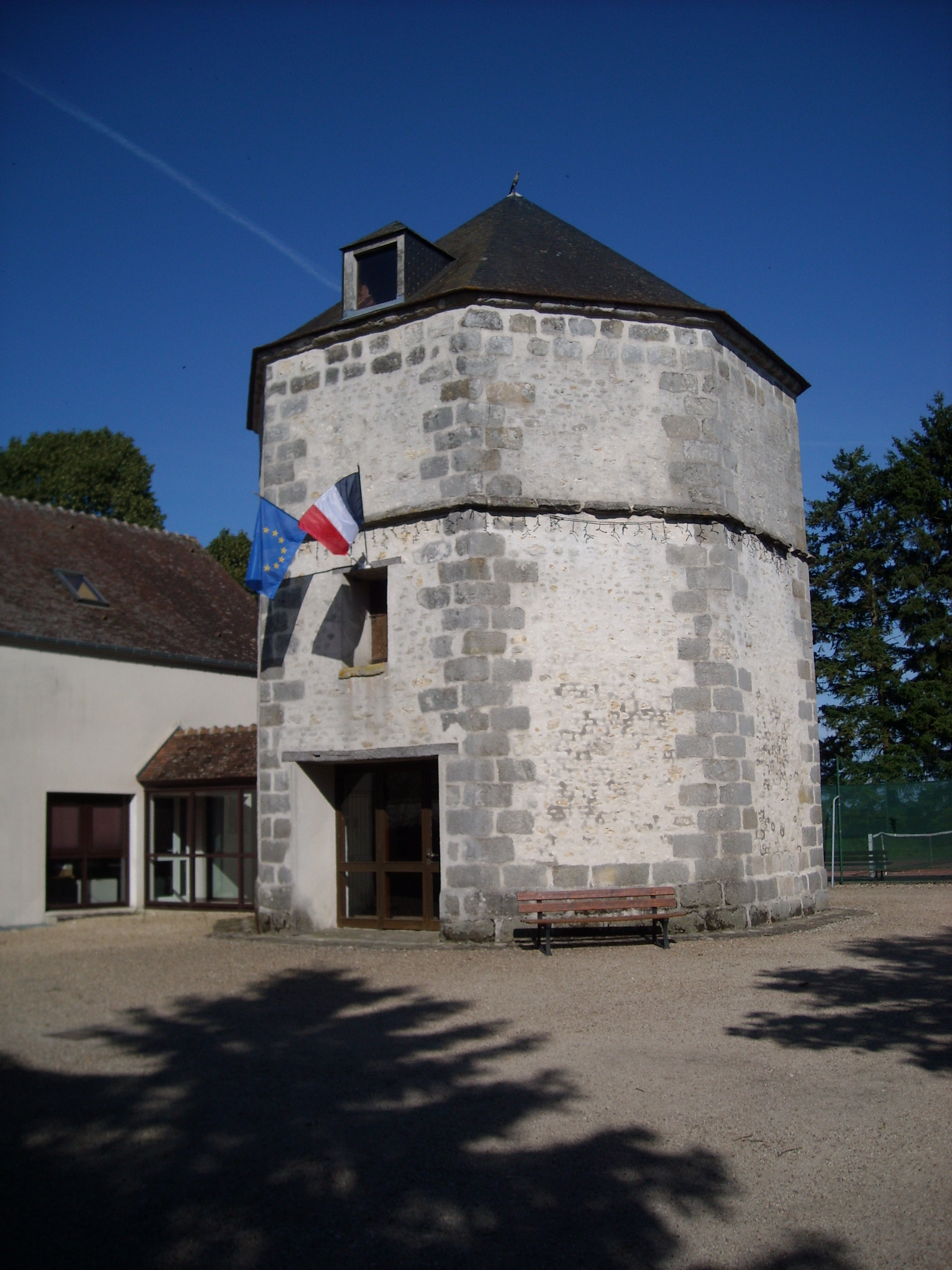 Colombier du château de Guercheville